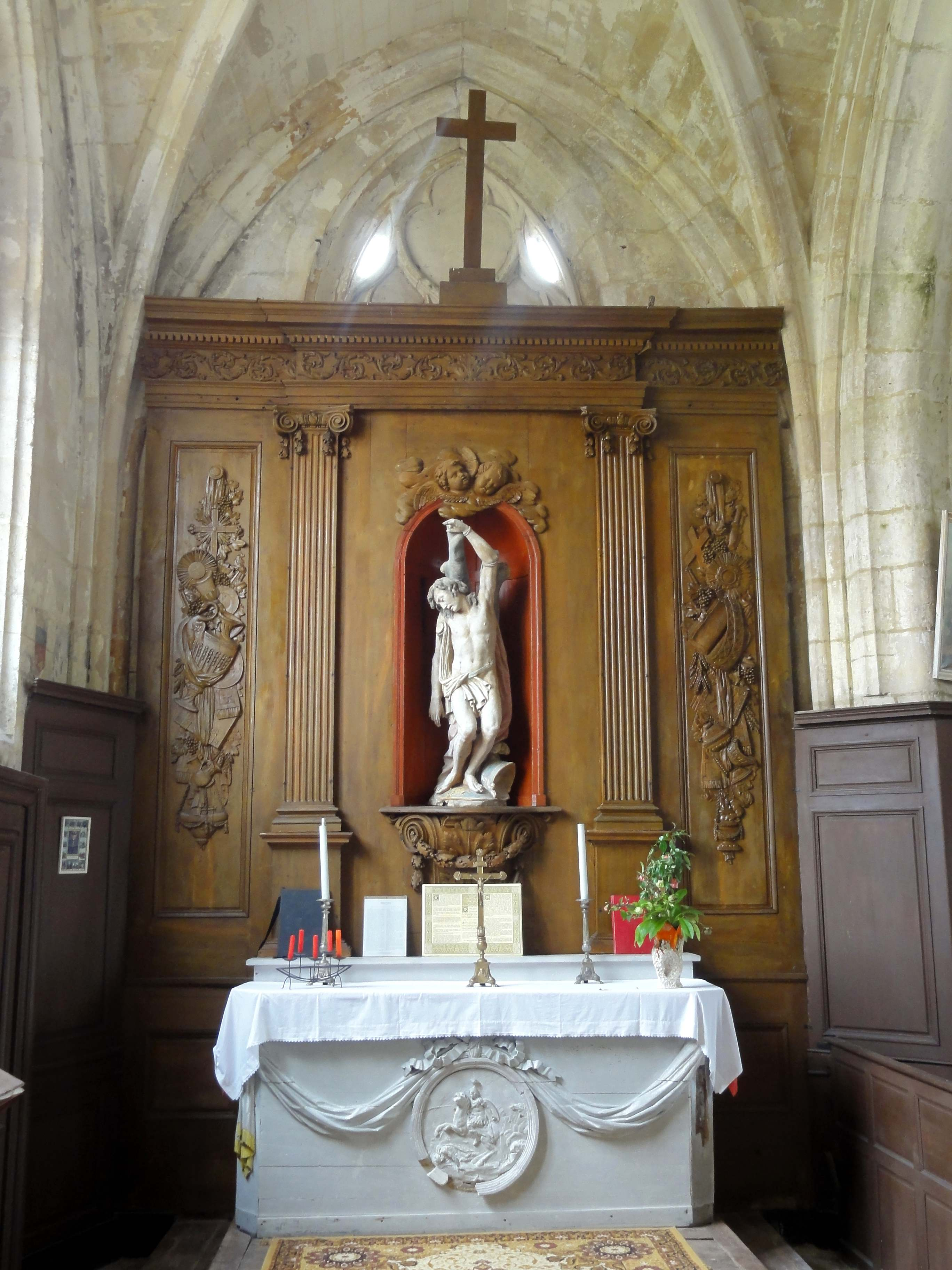 Mobilier de l'église - voir titre.